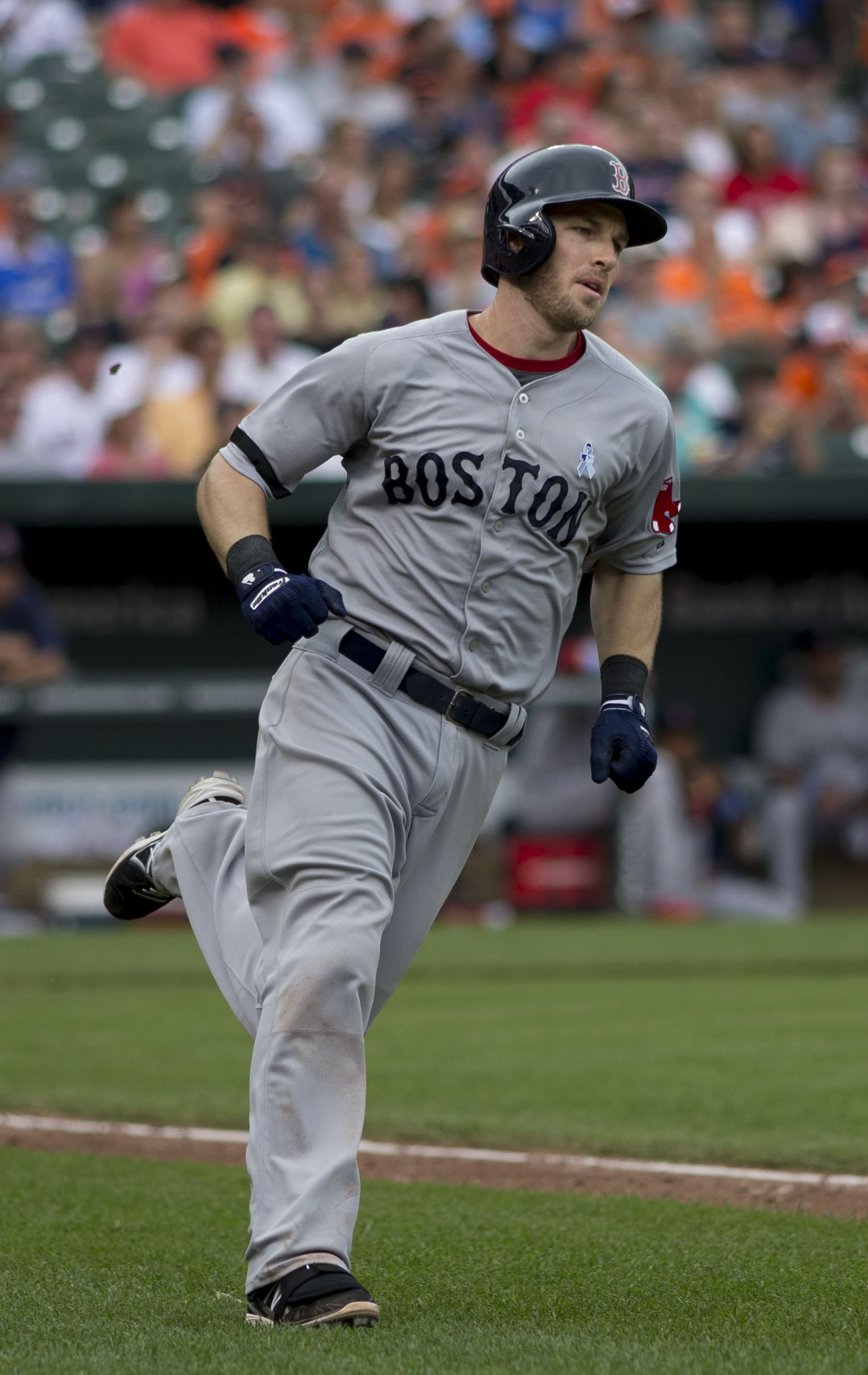 Stephen Drew